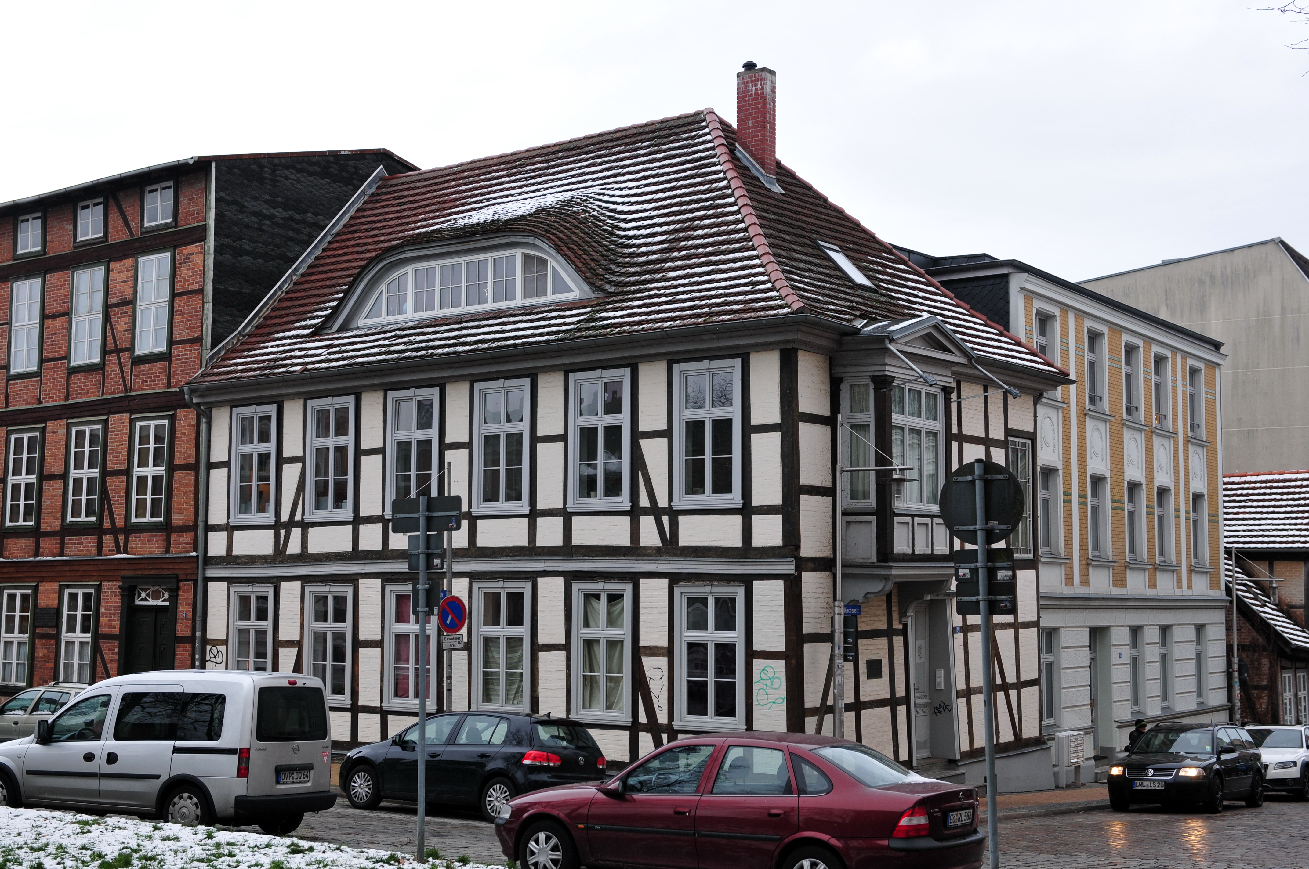 Das denkmalgeschützte Wohnhaus Kirchenstraße 2 an der Ecke zur Lindenstraße im Stadtteil Schelfstadt in Schwerin, Mecklenburg-Vorpommern.